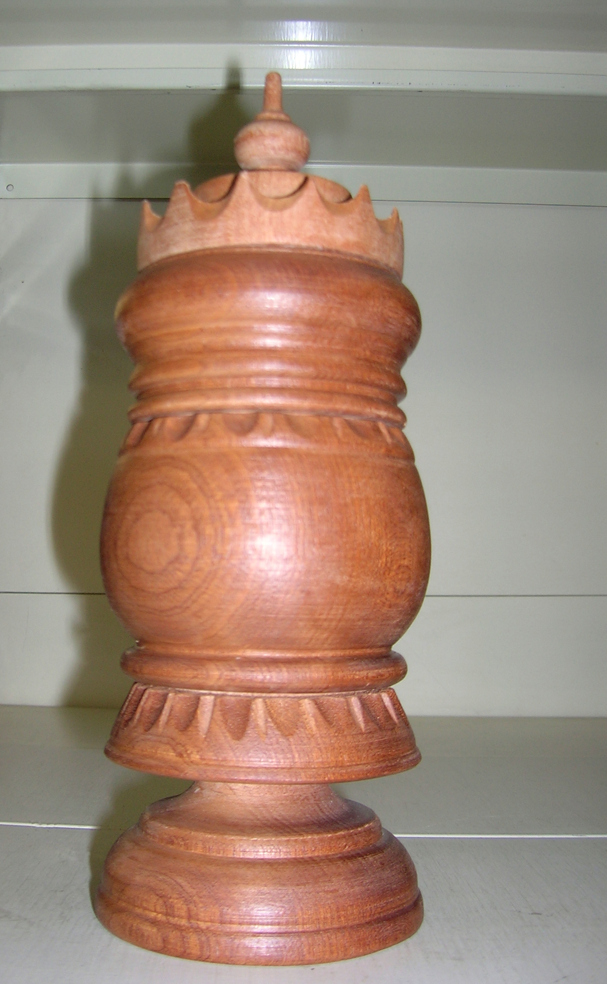 La grolla è un calice da vino in legno, nonché uno dei simboli della Valle d'Aosta, da non confondersi con la coppa dell'amicizia.